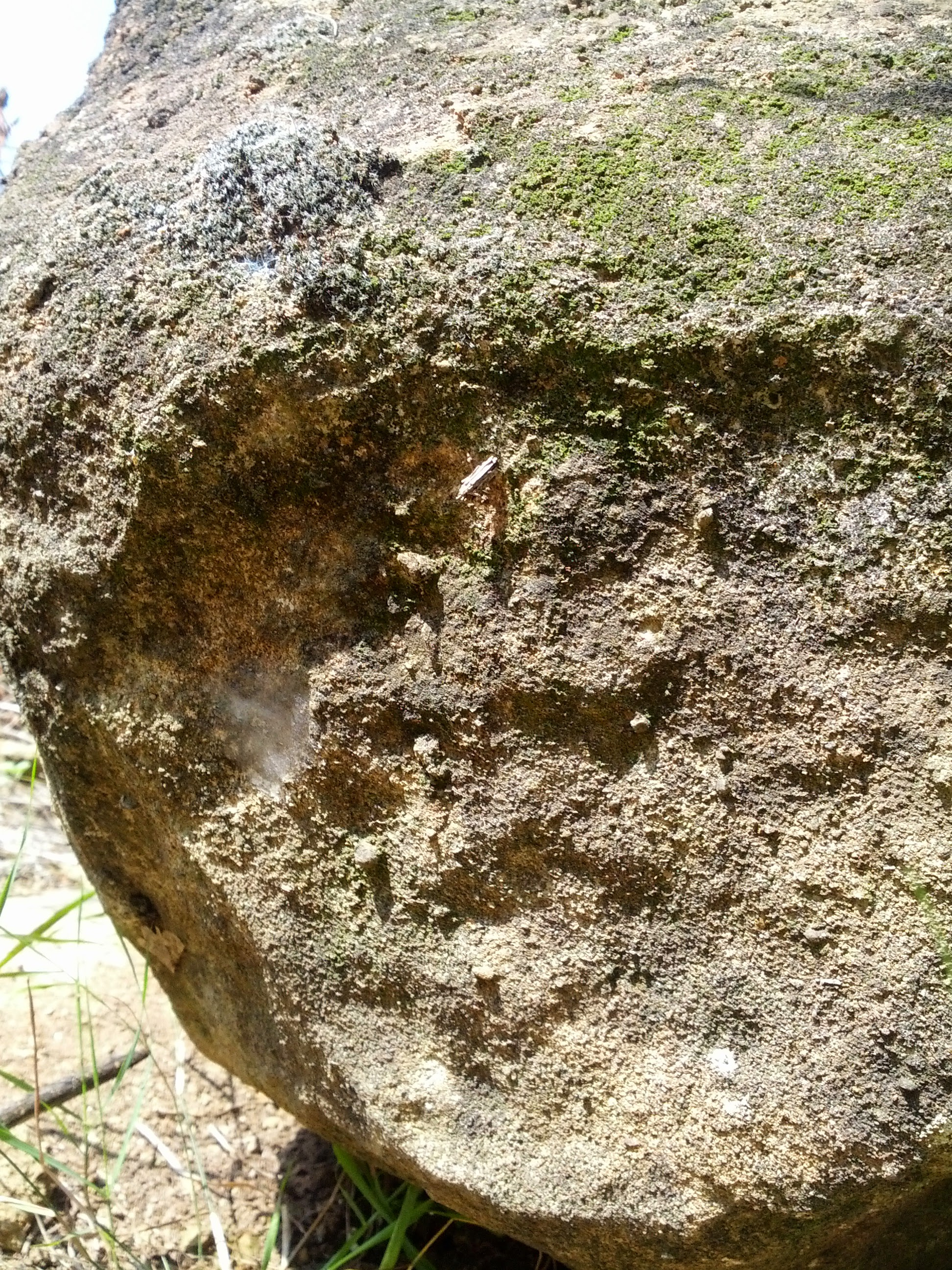 Megalits del Pla de Montargull, inscripció a una de les pedres del conjunt de pedres petites